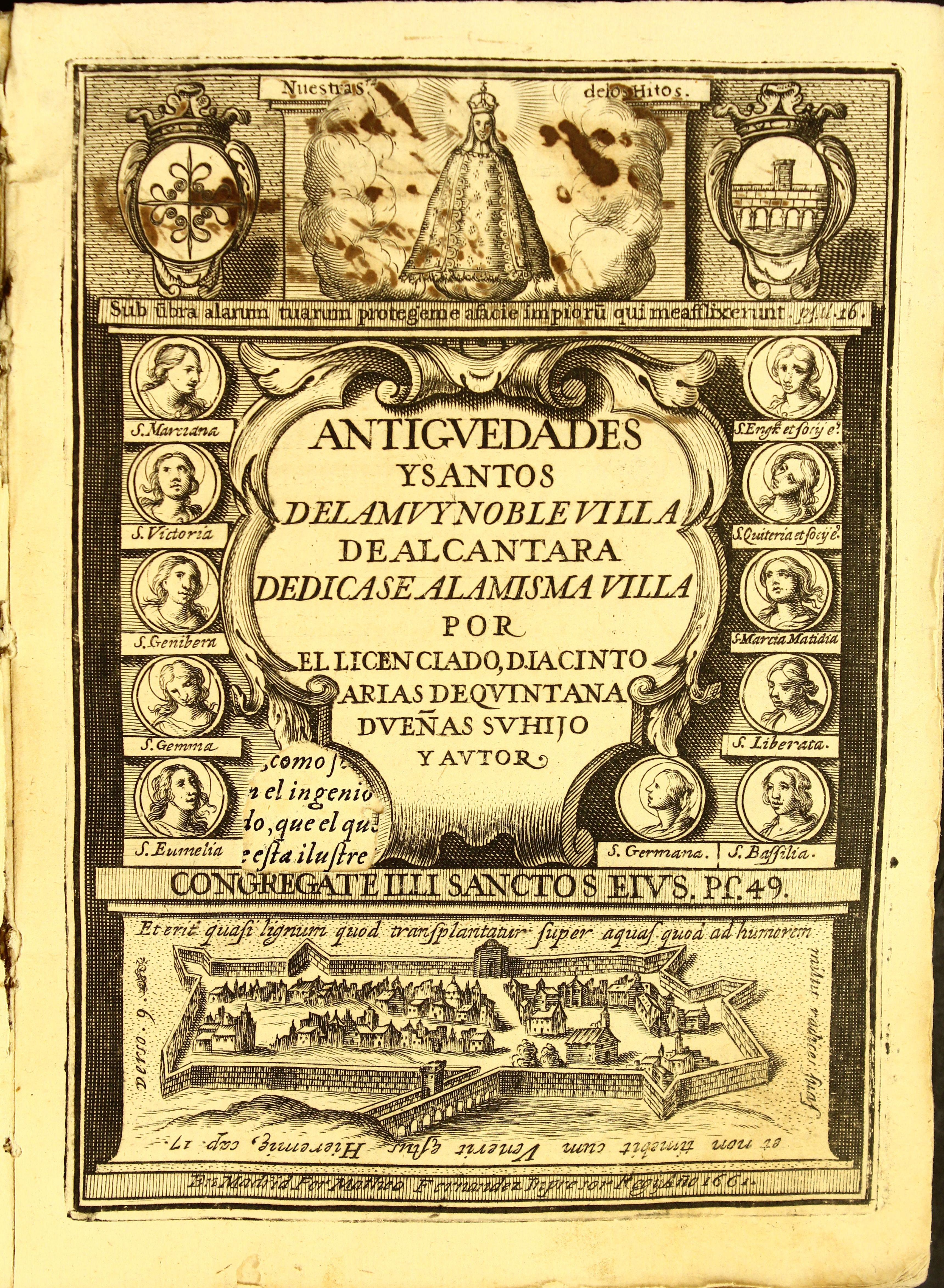 Portada del libro de Arias Quintanadueñas-1661